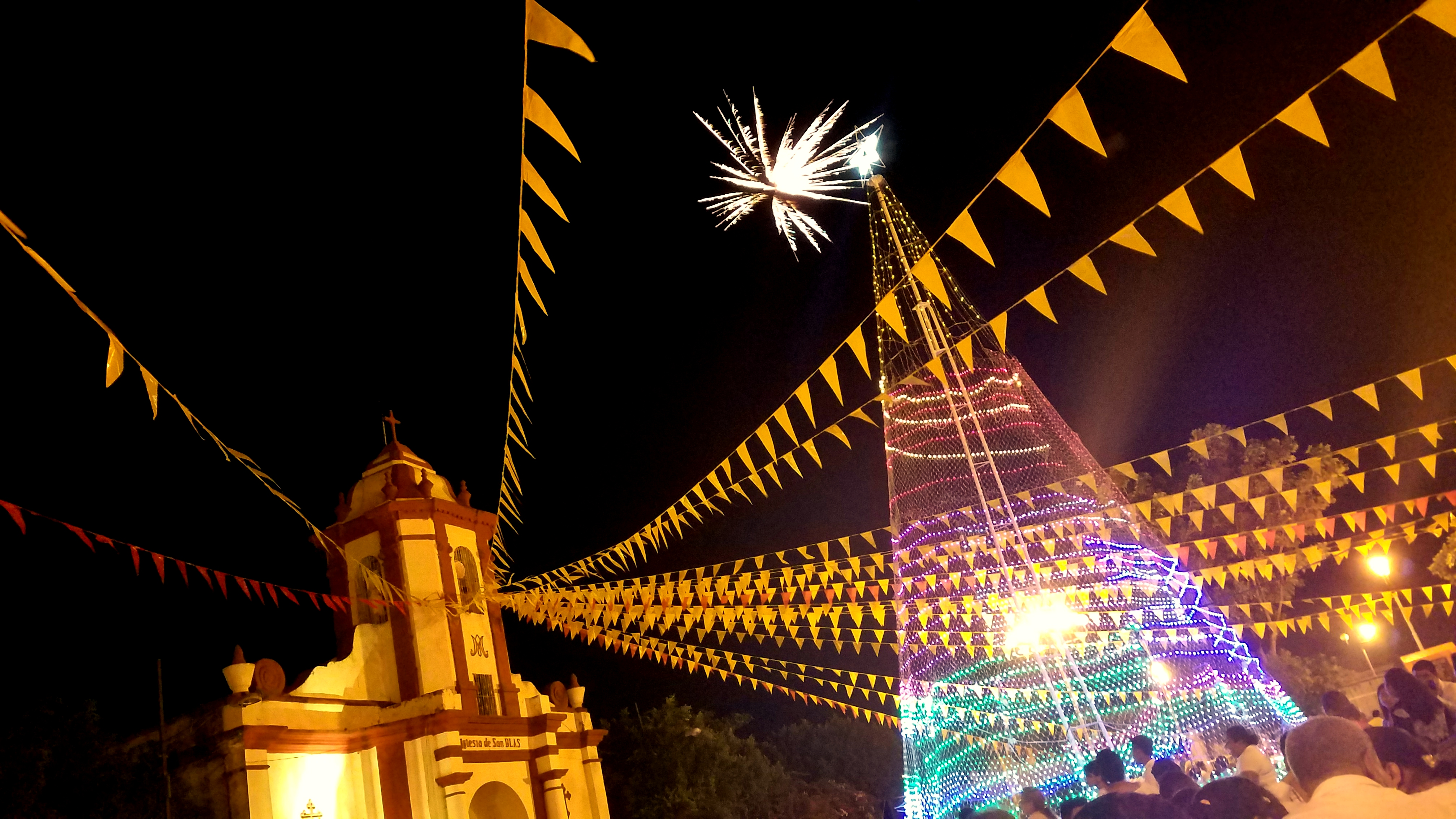 Plaza C. New Year